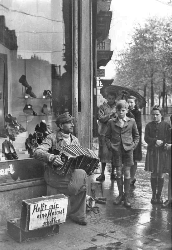 Kriegsversehrter Straßenmusikant Illus-dpd Die Not der Heimkehrer. "Helft mir eine Heimat schaffen" steht auf dem abgeschabten Koffer des Russlandheimkehrers, der ohne Heimat, Angehörige und Wohnrecht vorübergehend in einem Flüchtlingslager bei Karlsruhe Aufnahme fand. Jetzt zieht er mit seiner Ziehharmonika von Stadt zu Stadt. Von den Spenden hofft er, sich bald eine Bleibe schaffen zu können. Landserschicksal! 10-5-49 3191-49